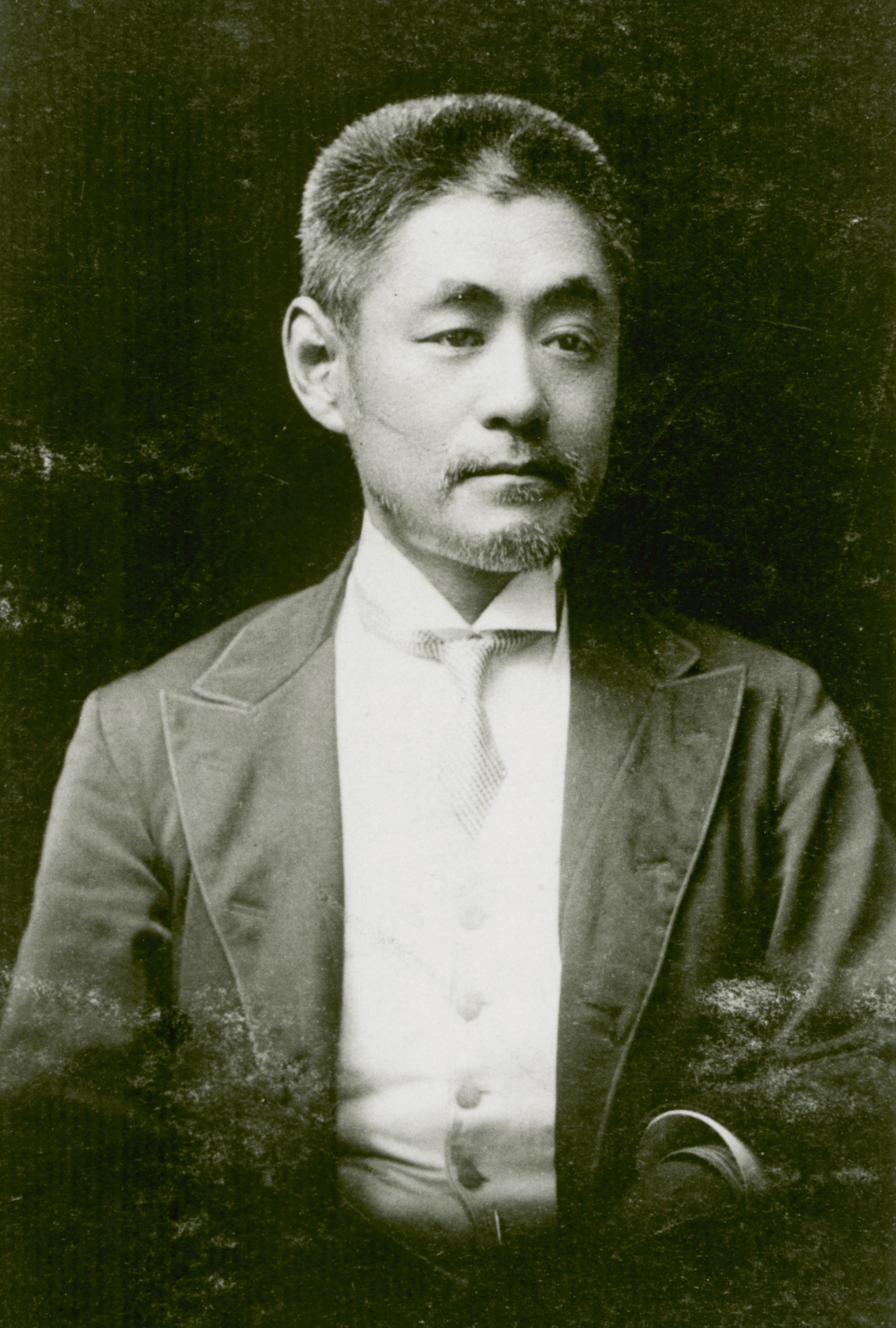 Le philosophe Inoue Enryō en 1903-1905